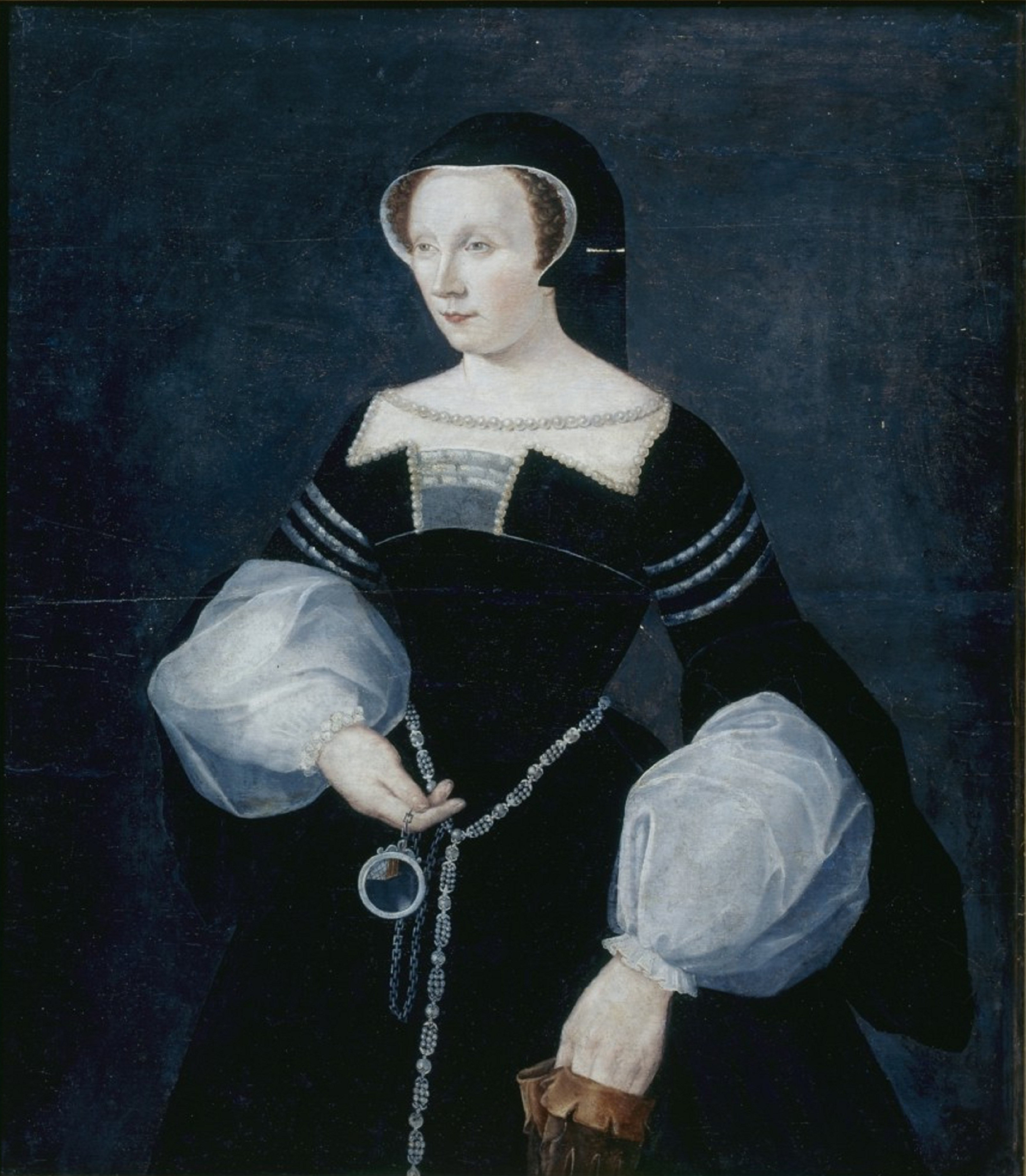 Diane de Poitiers a widowlabel QS:Len,"Diane de Poitiers a widow" label QS:Lde,"Diane de Poitiers als Witwe"